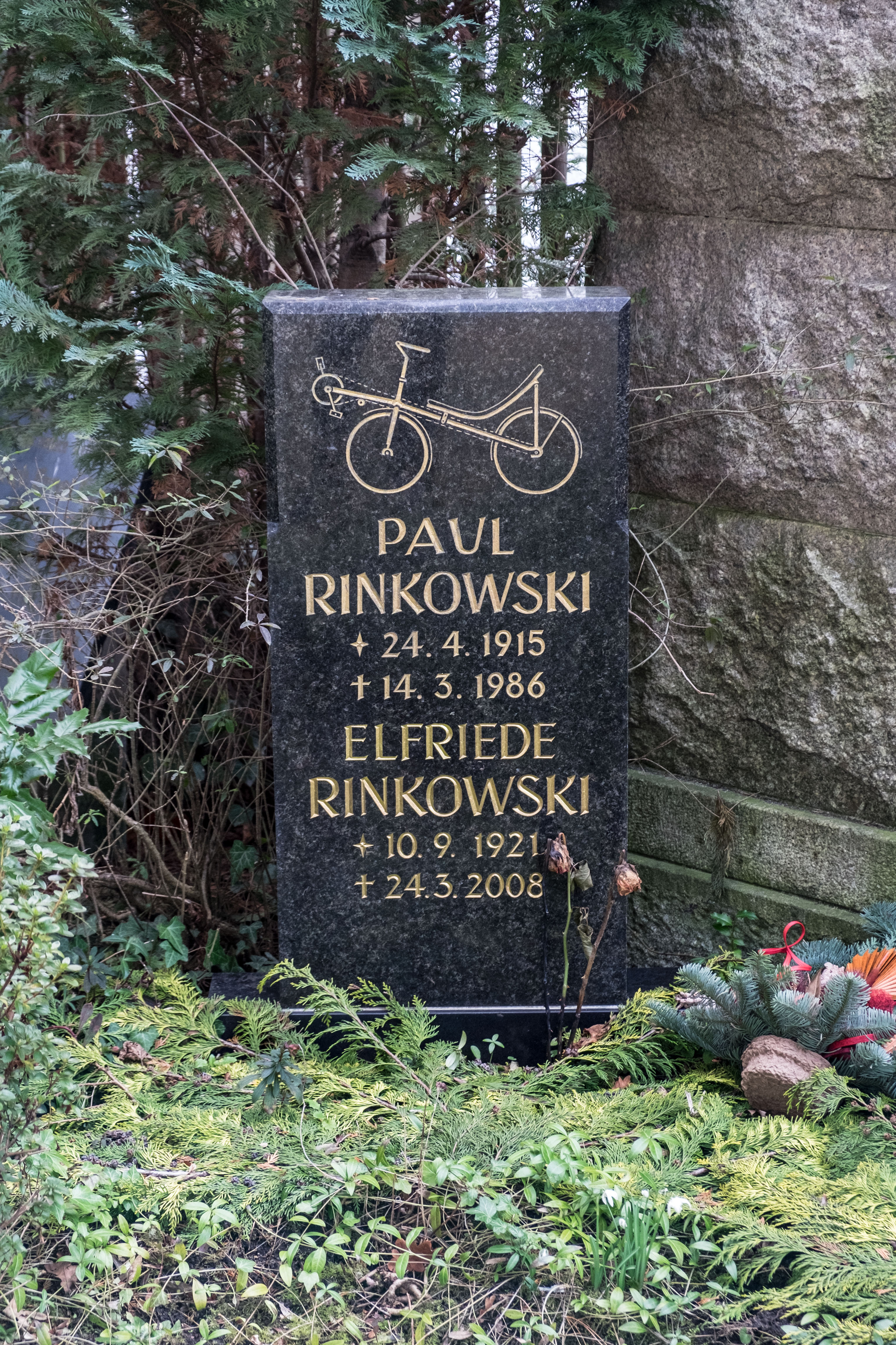 Der Grabstein Paul Rinkowskis auf dem Stötteritzer Friedhof